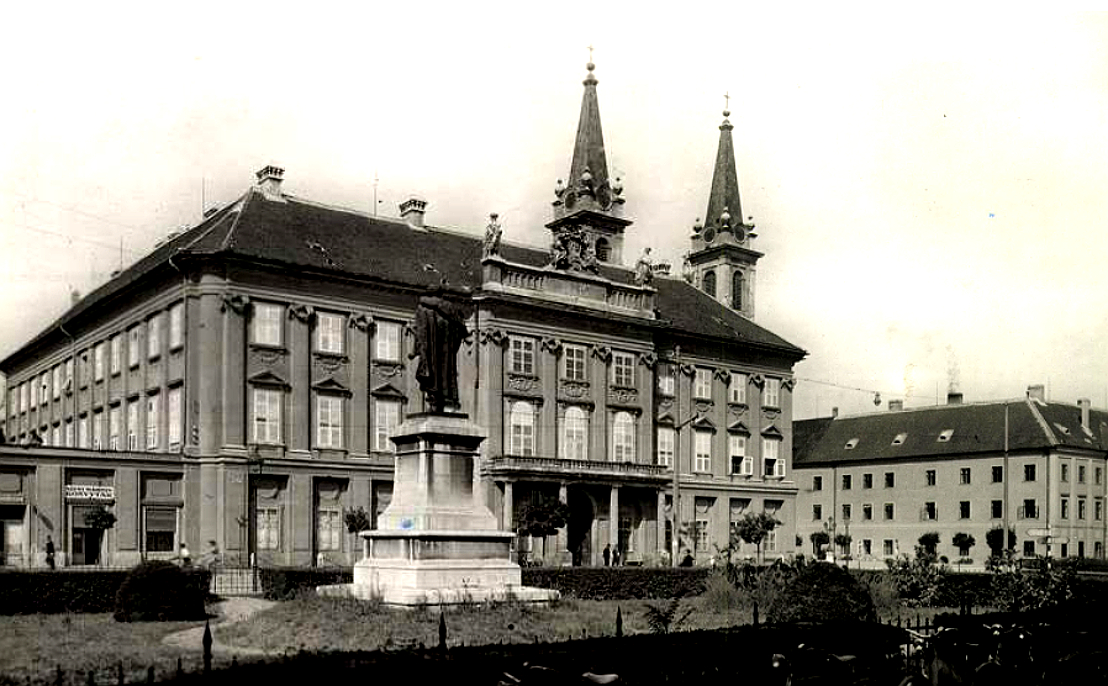 Szombathelyi püspöki szeminárium épülete postai levelezőlapon 1935 körül. - Szombathely, Berzsenyi Dániel tér